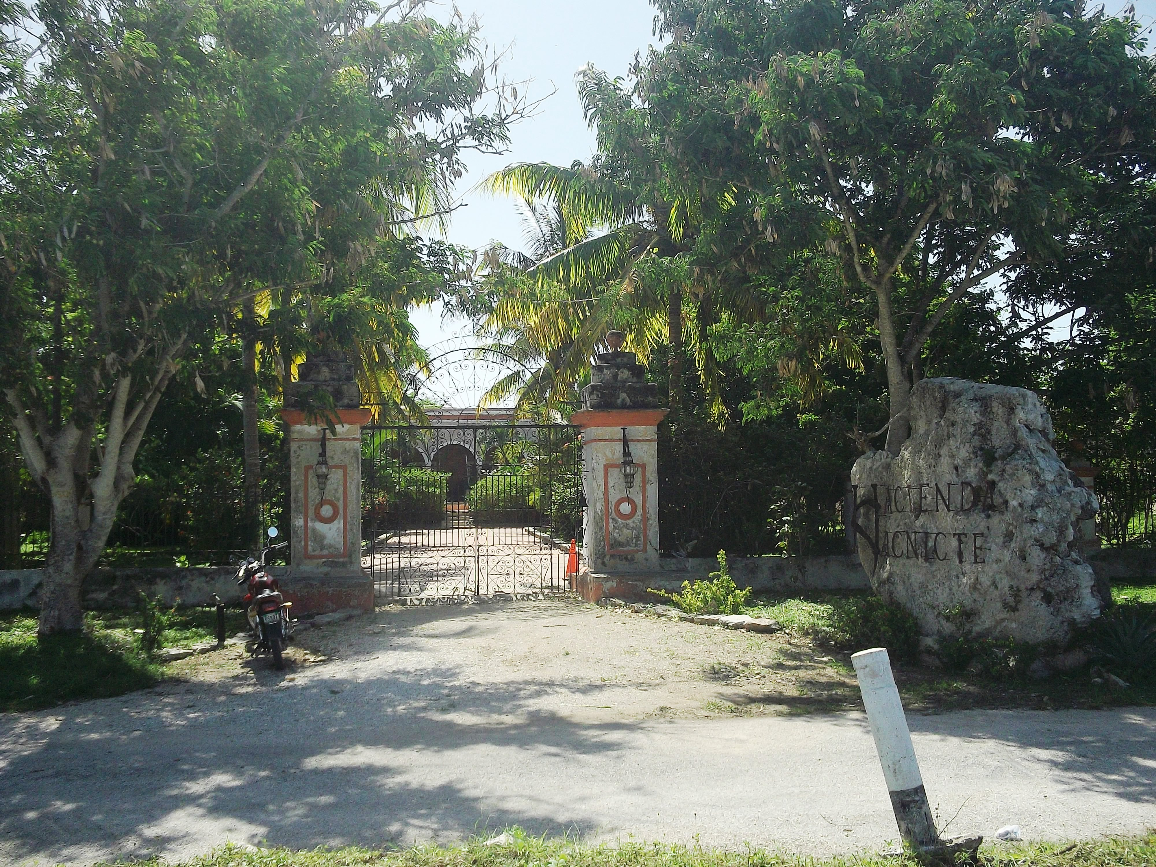 Hacienda de Sac Nicté (Izamal), Yucatán.